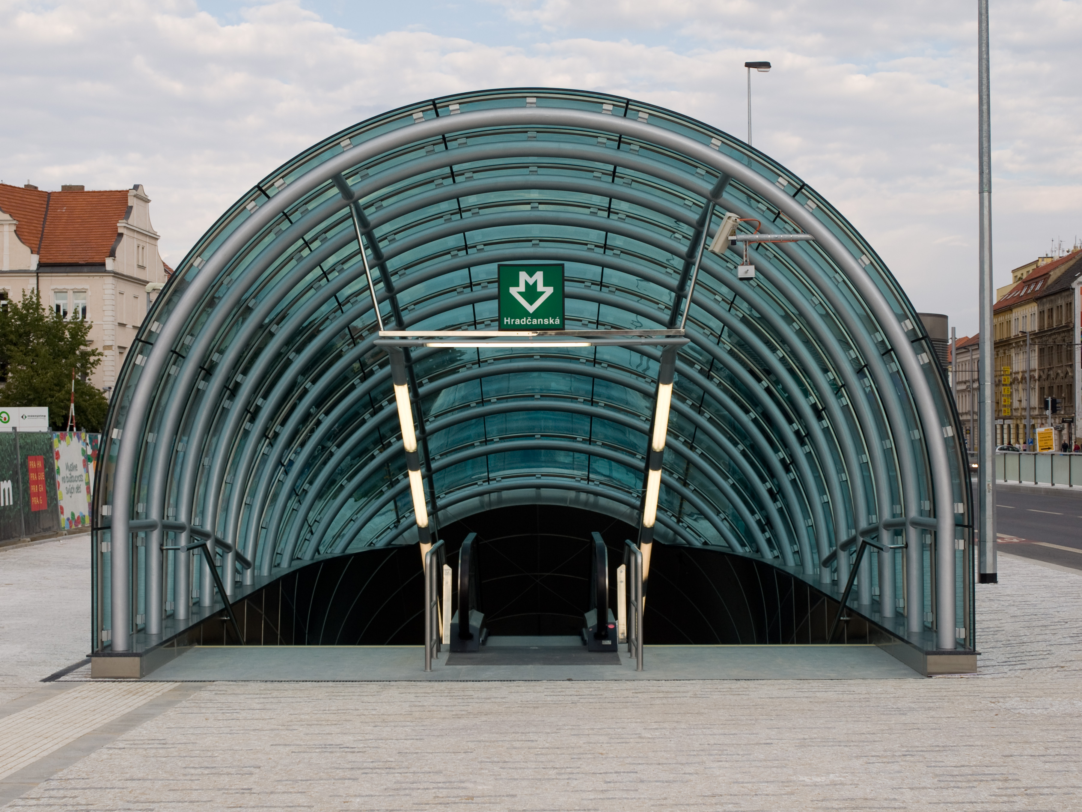 Východ z metra, Hradčanská, Praha